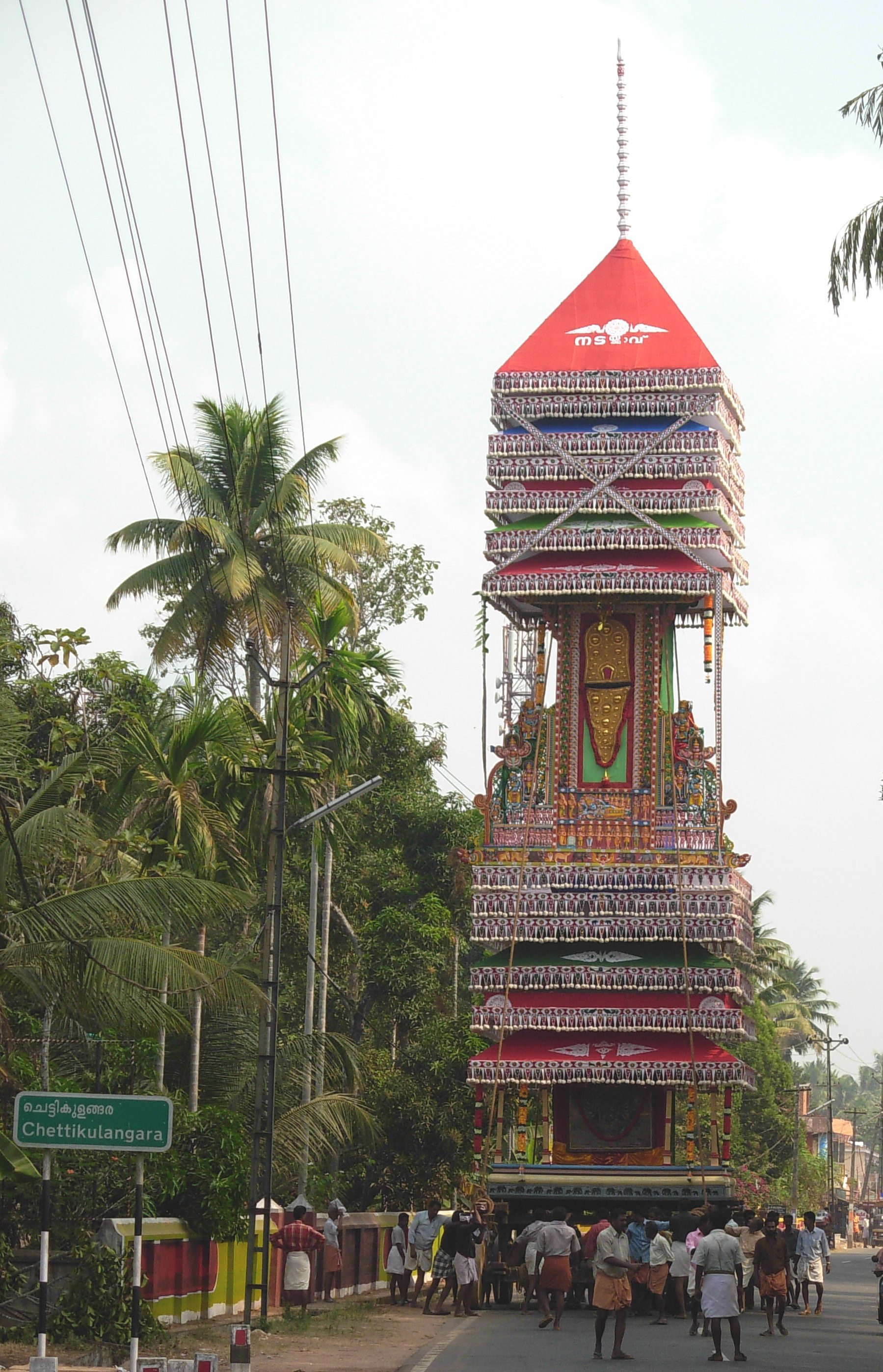 ചെട്ടികുളങ്ങര ക്ഷേത്രത്തിലെ ഭരണി ഉത്സവത്തോടനുബന്ധിച്ചുള്ള കെട്ടുകാഴ്ചയുടെ ദൃശ്യം. 2009